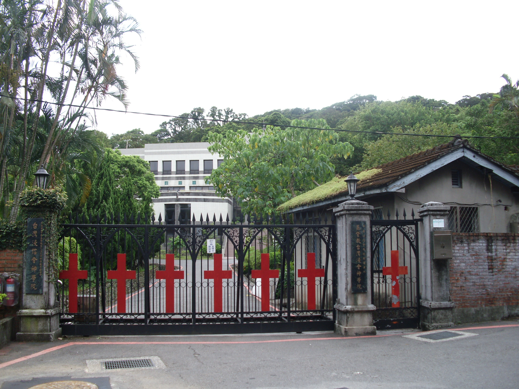 Bân-lâm-gú: 基督教台灣浸會神學院大門